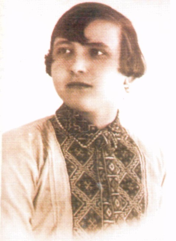 поетеса Закарпаття міжвоєнного періоду, активіст Просвіти. Членкиня Пласту на Закарпатті.